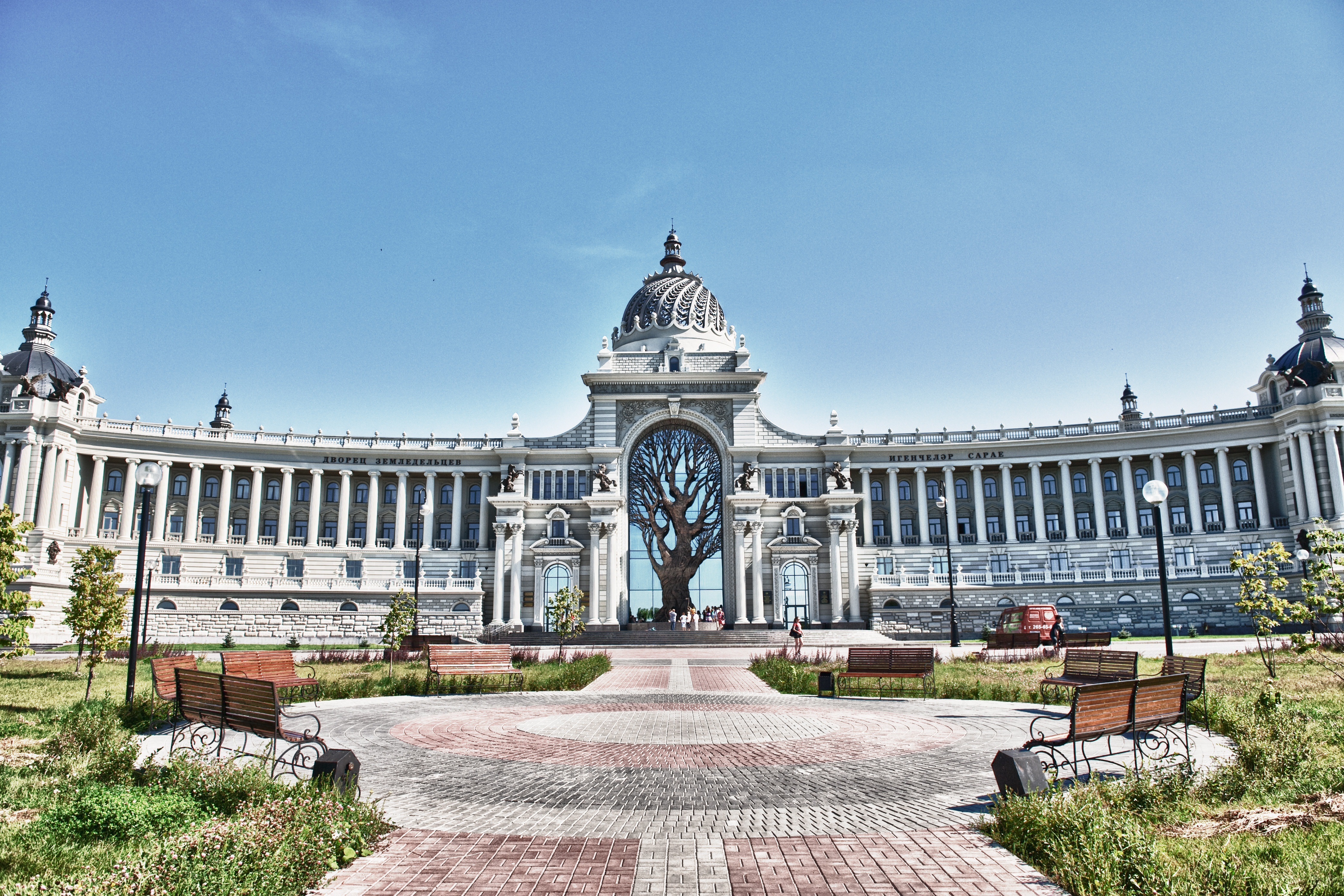 Дворец земледельцев